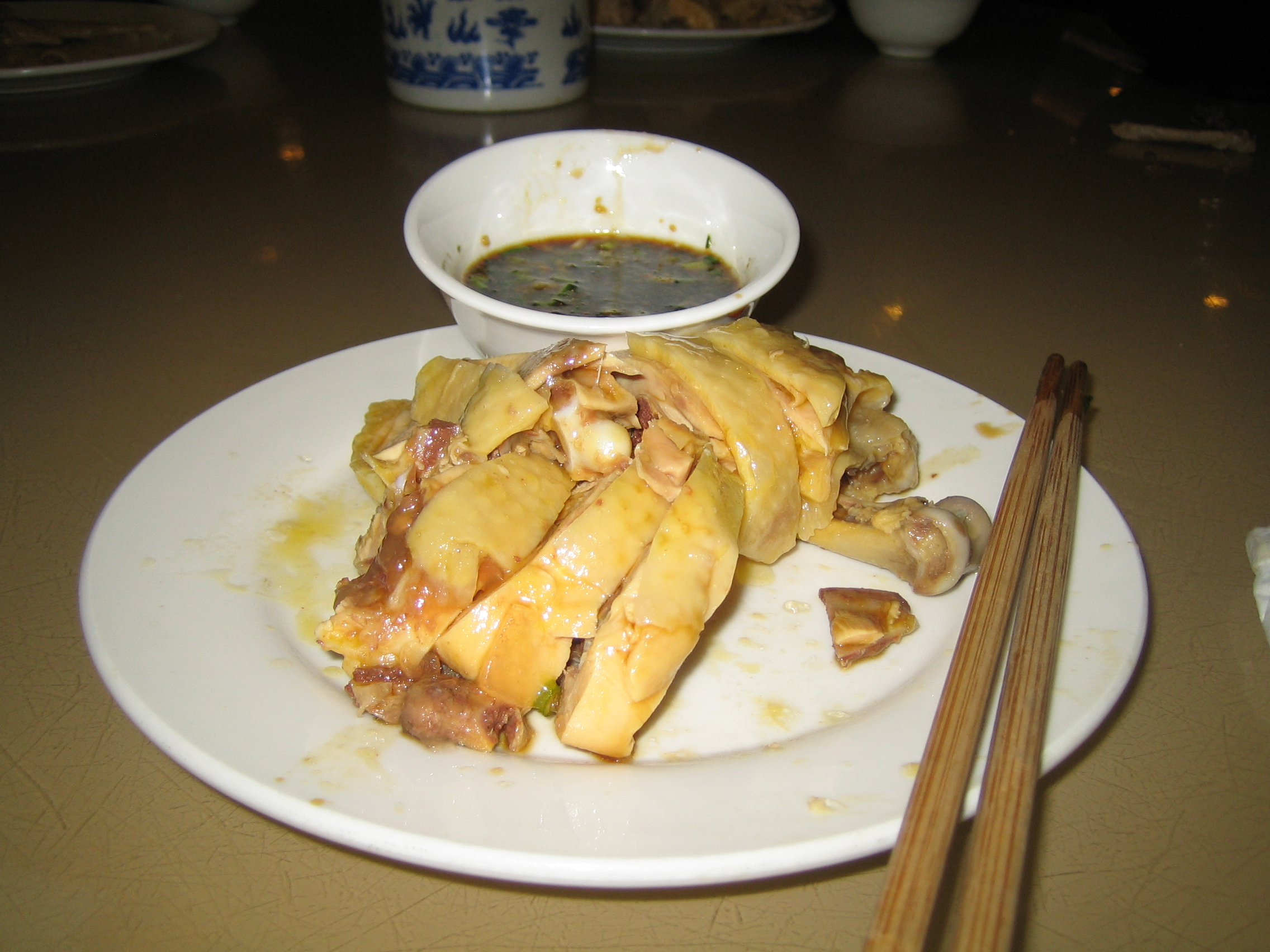 中文（中国大陆）: 小绍兴酒家的白斩鸡